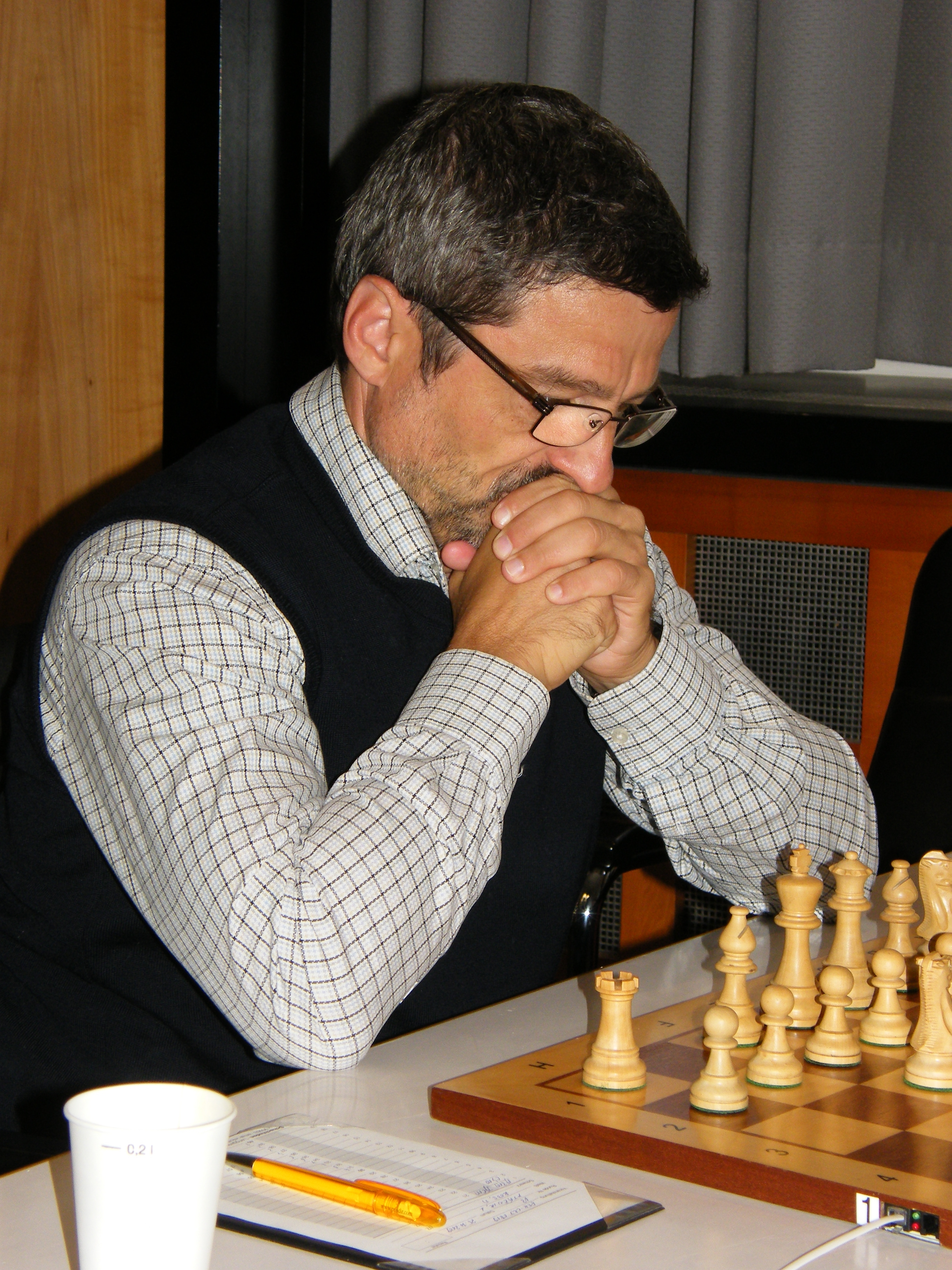 Lubomir Ftacnik bei der 3. Runde der Schach-Bundesliga 2008/09 im Rathaus Schöneberg in Berlin